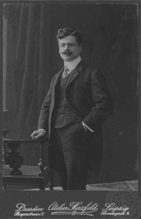 Георгиос Сагяксис